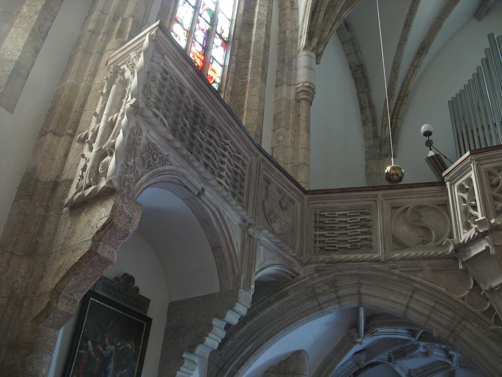 Wehrkirche St. Oswald, Eisenerz, Steiermark, Empore